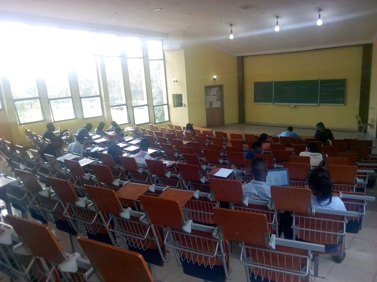 C'est une photographie d'un auditoire de sciences quelques minutes avant l'arrivée du professeur du cours.